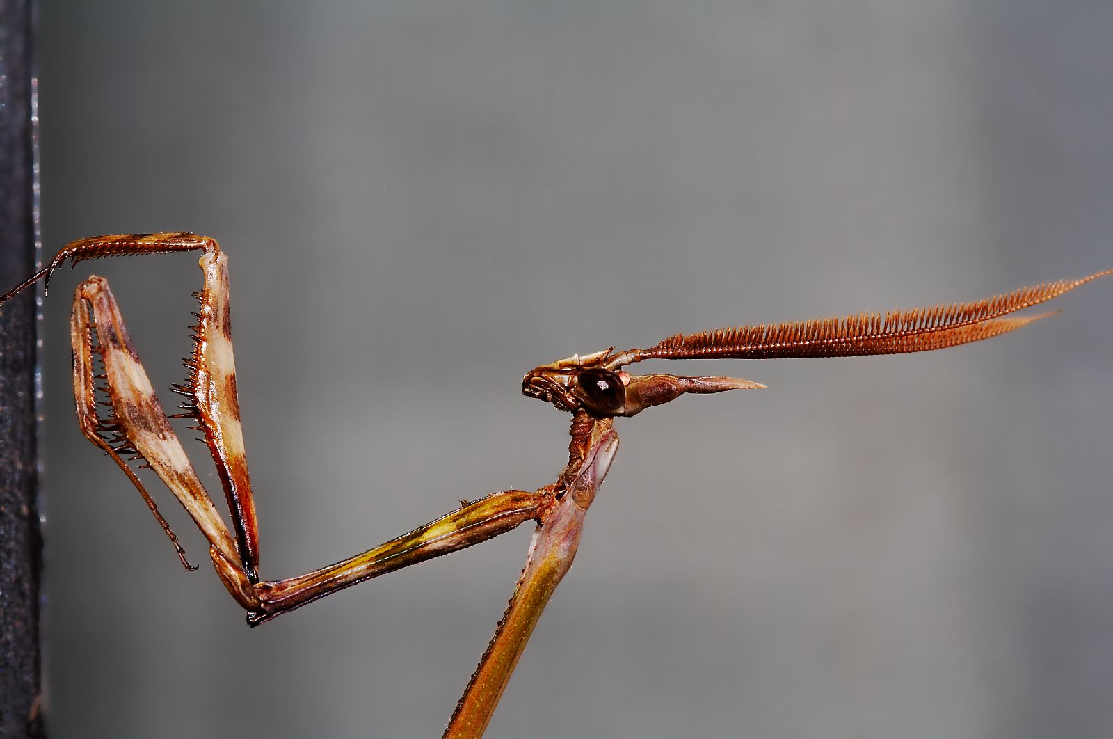 Empusa pennata, male.